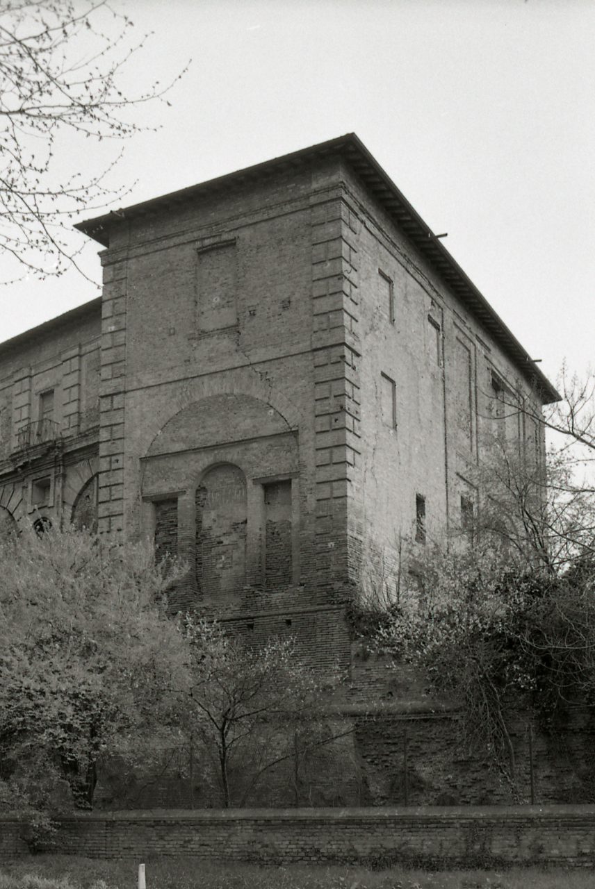 Castello dei Pico, Mirandola. Original description